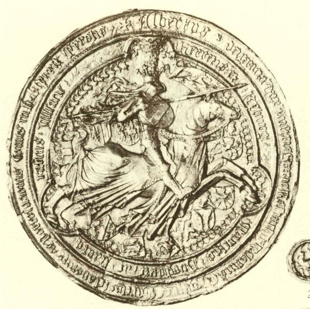 This is a scan of the historical document: Title: Die Siegel der deutschen Kaiser und Könige v. 2 (1347 - 1493)